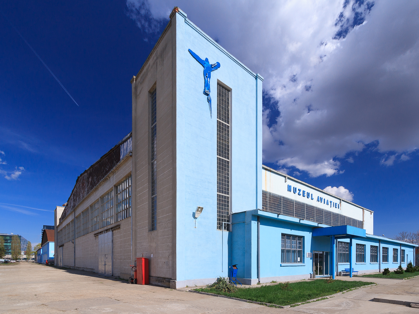 Muzeul Aviatiei